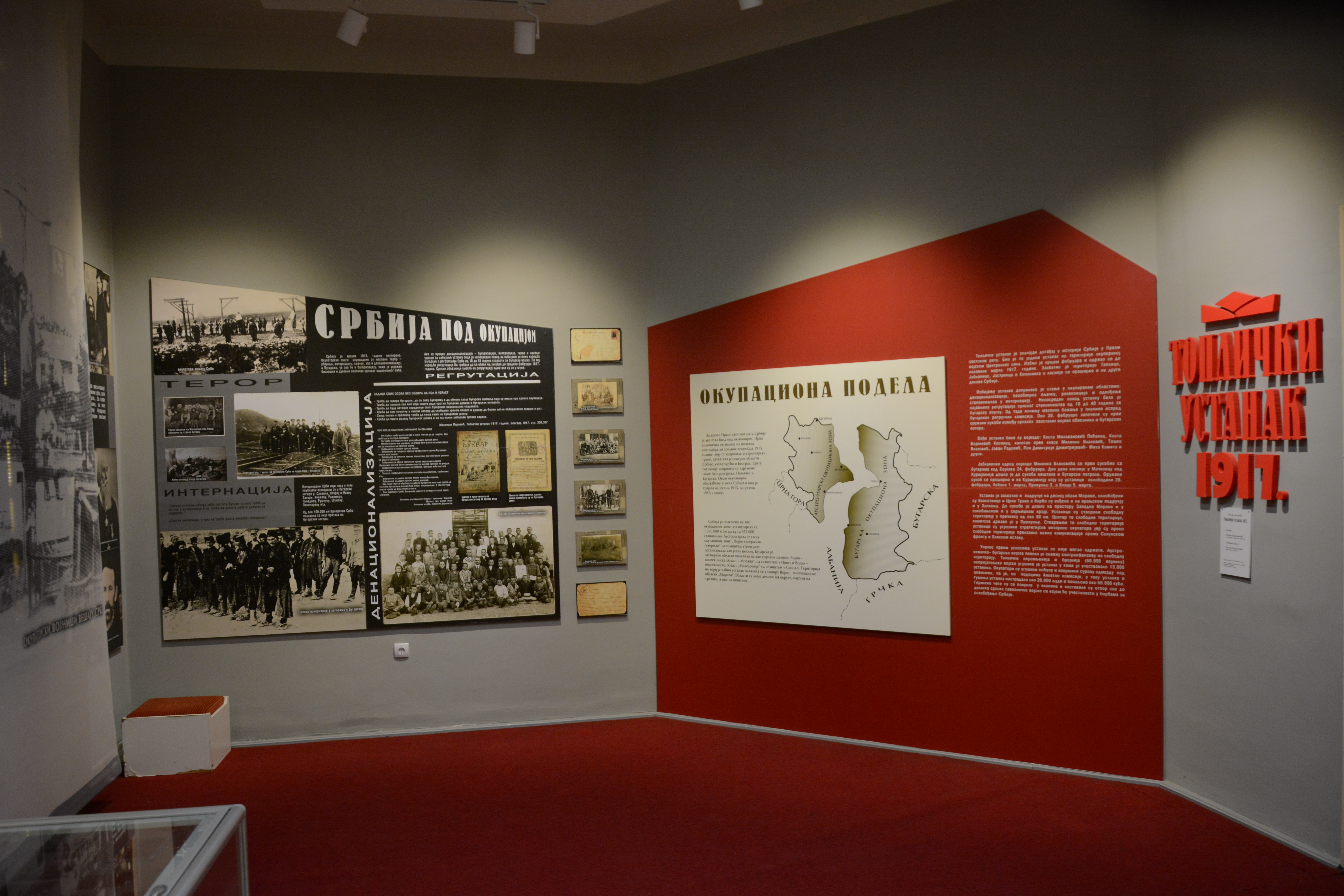 Ова датотека је донација Народног музеја Топлице, у оквиру програма стажирања реализованог од стране Викимедије Србије. This file is donated by the National museum of Toplice, as part of the Wikipedian in Residence program implemented by Wikimedia Serbia.